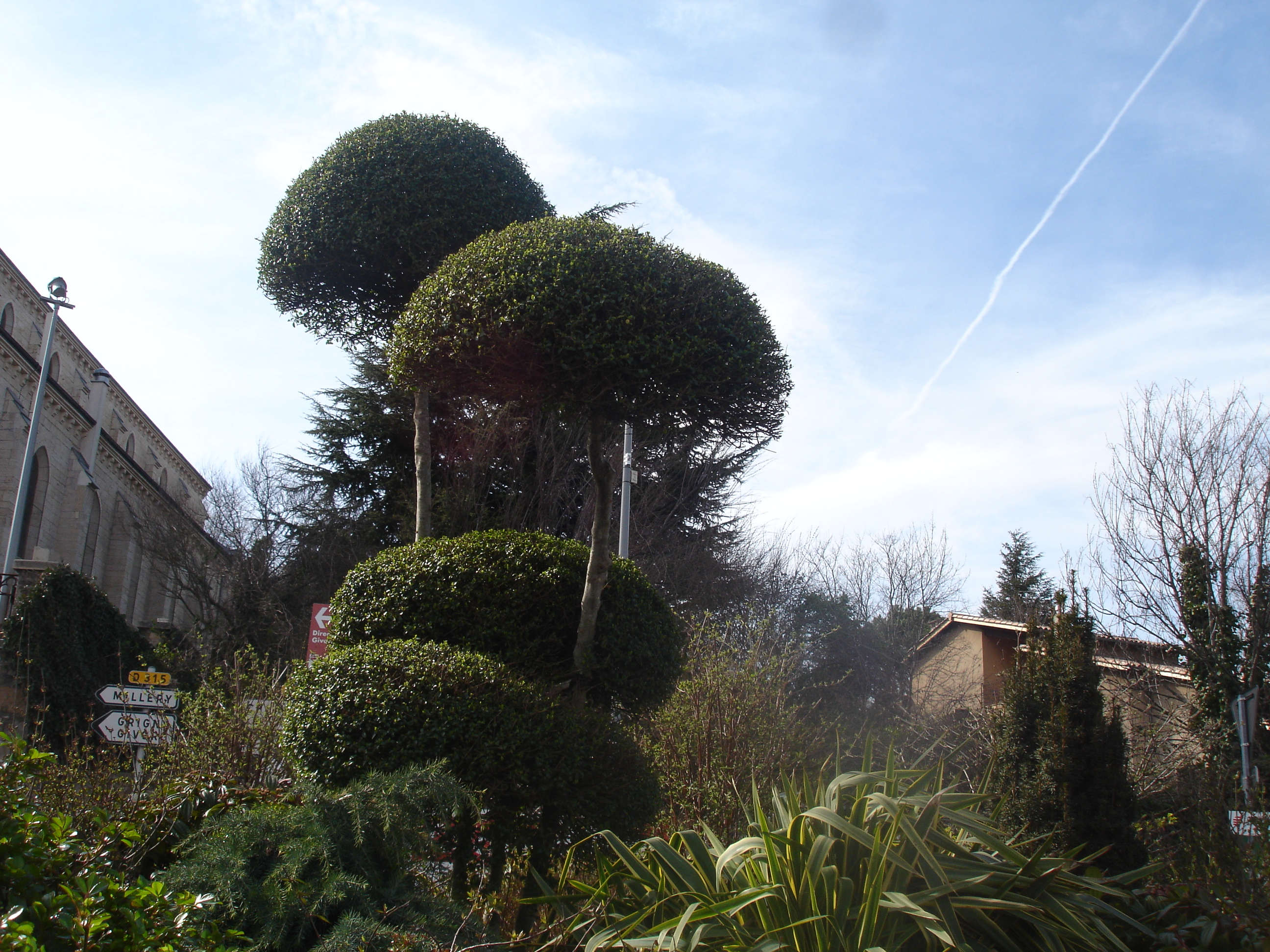 Vernaison (69) : square de la mairie